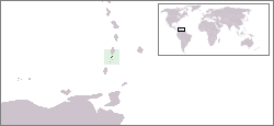 Description:Carte de localisation de l'île de Bequia, Saint-Vincent-et-les Grenadines Auteur:Rémih à partir d'une carte du CIA WorldFactBook